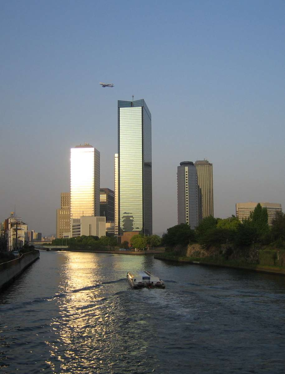 大阪ビジネスパーク（大阪府大阪市中央区城見） 2005.05.03 Mangos撮影